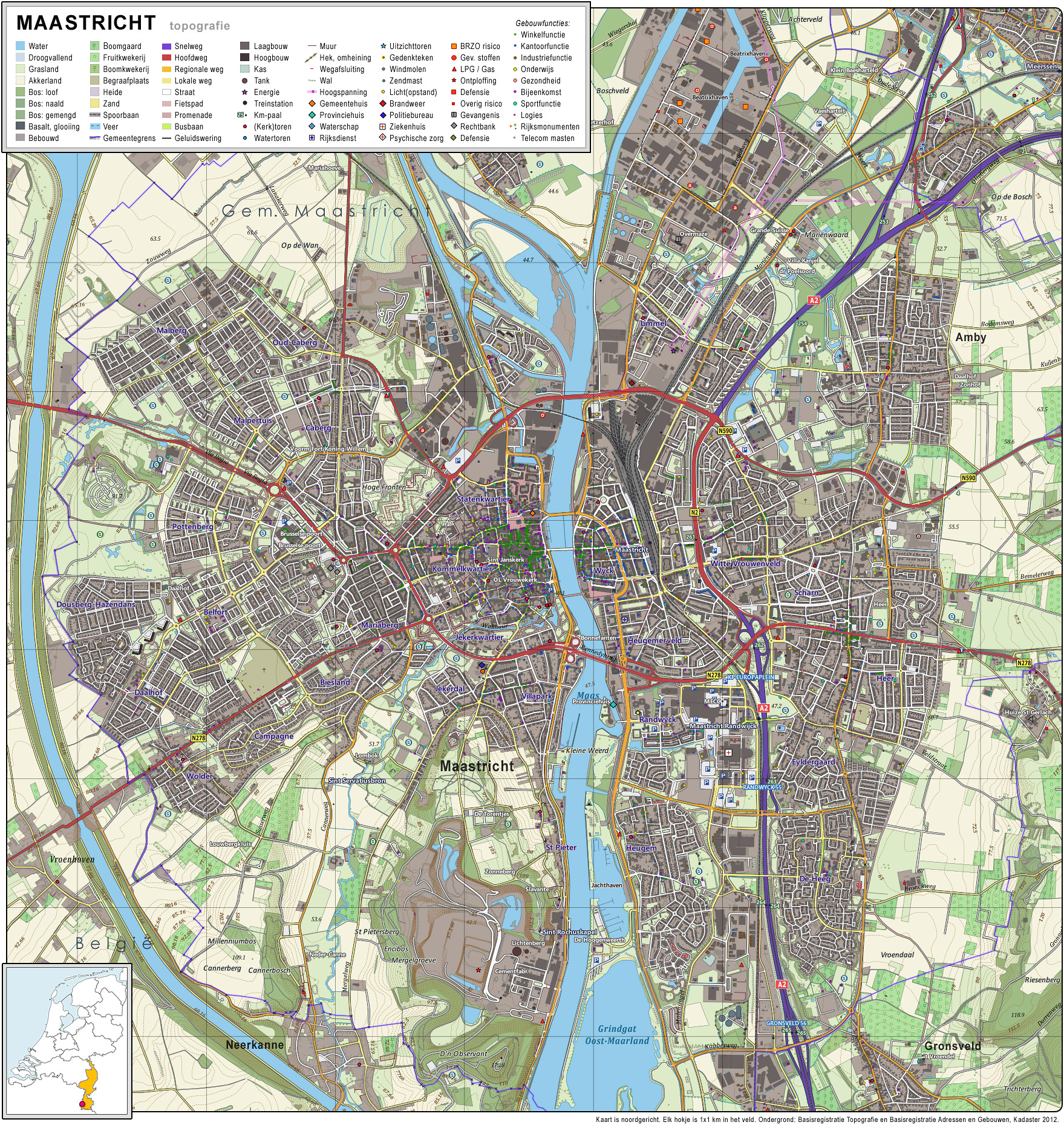 Topografisch beeld van de stad Maastricht. Op basis van de GML open geodata van de BRT/Top10NL (basisregistratie Topografie, Kadaster 2012), vrijgegeven door Kadaster op 30-11-2012 onder de Creative Commons BY licentie. Gebouwvlakken vanuit Open Geodata BAG extract (december 2012). Samenstelling en kleurenschema: Jan-Willem van Aalst, met QuantumGIS en Photoshop.